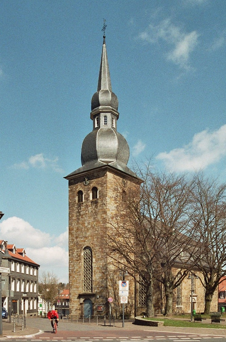 Die evangelische Kirche in Niedersprockhövel, Sprockhövel, Deutschland This is a photograph of an architectural monument.